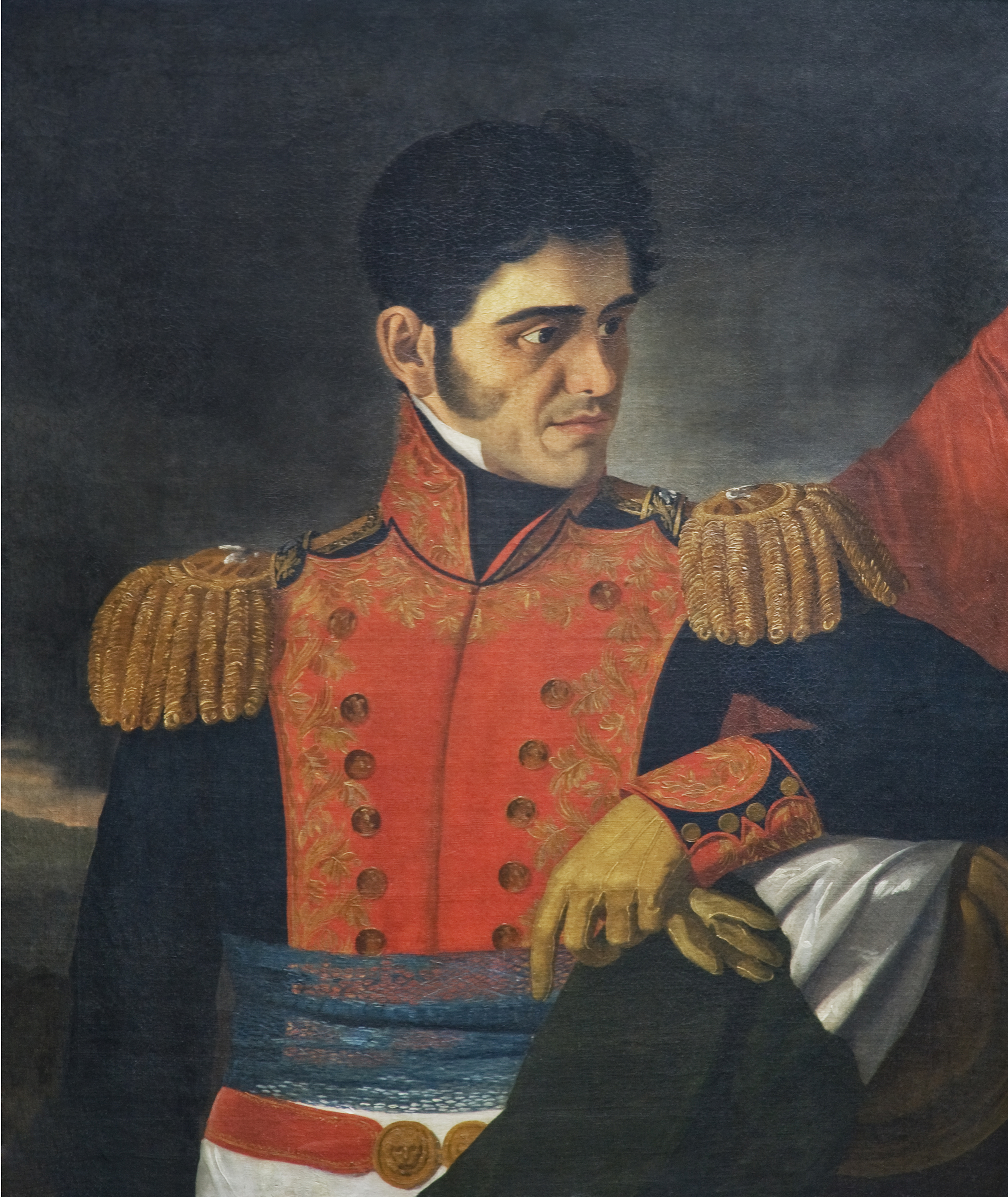 Carlos Paris. Portrait of Antonio López de Santa Anna (1794-1876)).